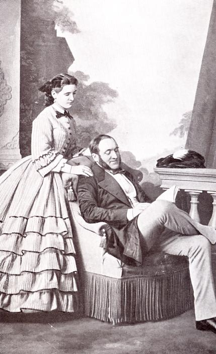 Georges Haussmann et sa fille Valentine